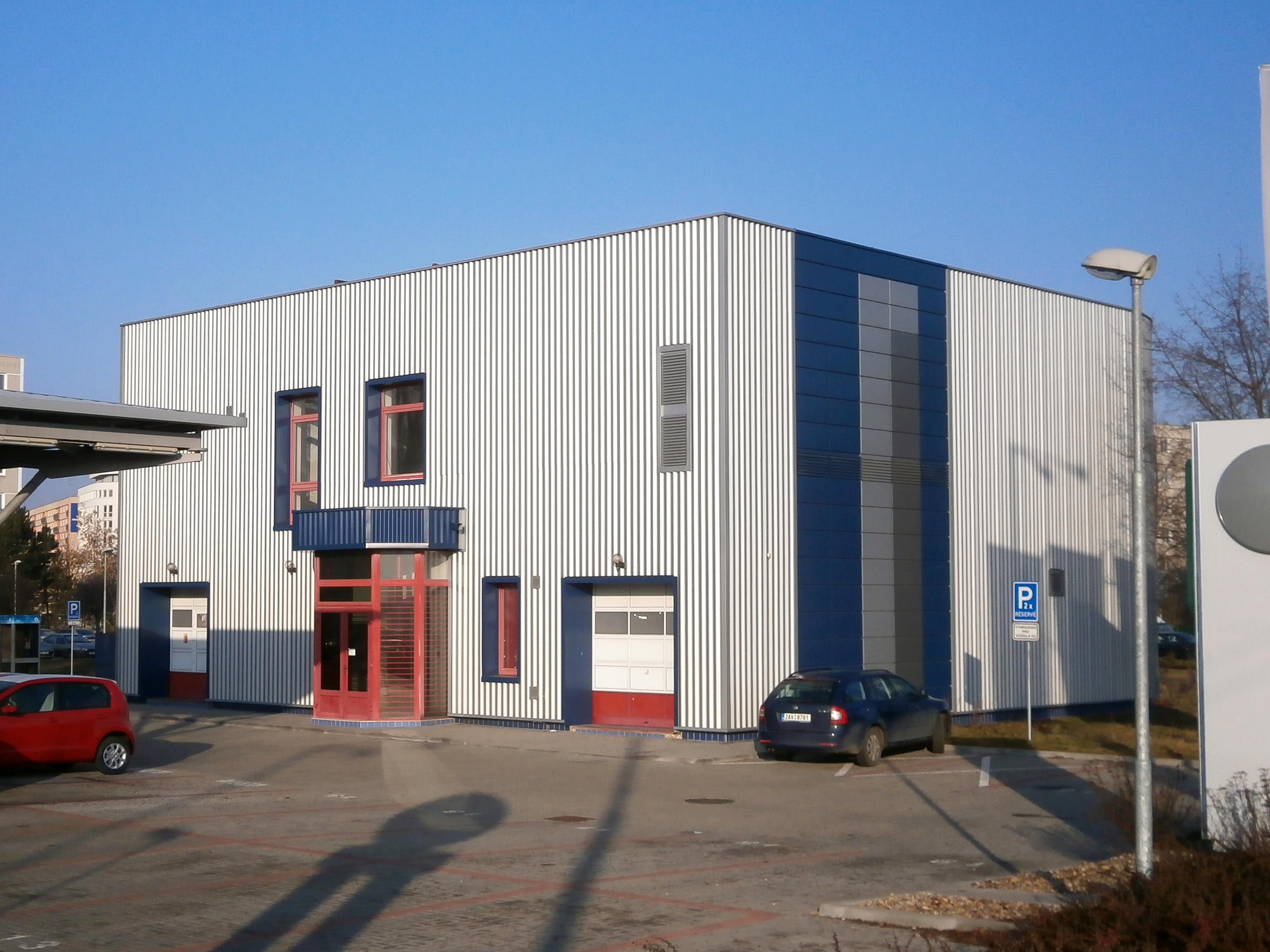 Telefonní ústředna na Moravském Předměstí (Ulice Pod Zámečkem čp. 1749, Hradec Králové)